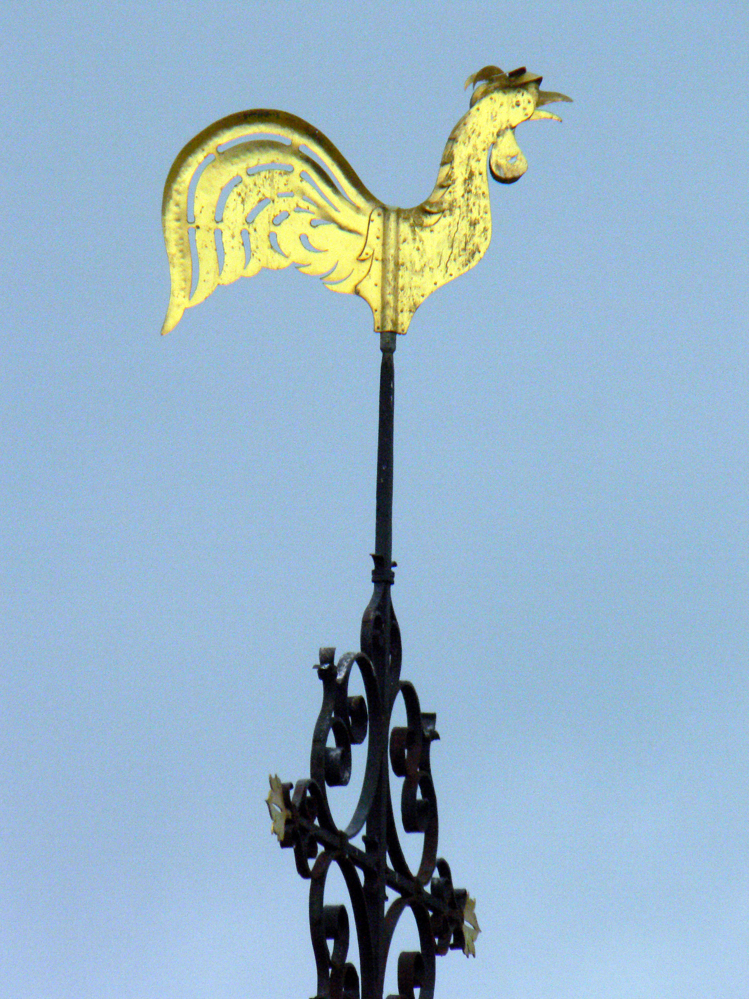 Wetterhahn auf der Schlosskapelle in Diez